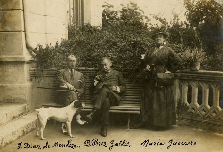 María Guerrero i Fernando Díaz de Mendoza a casa de Benito Pérez Galdós a San Quintin (Santander). 1900-1910